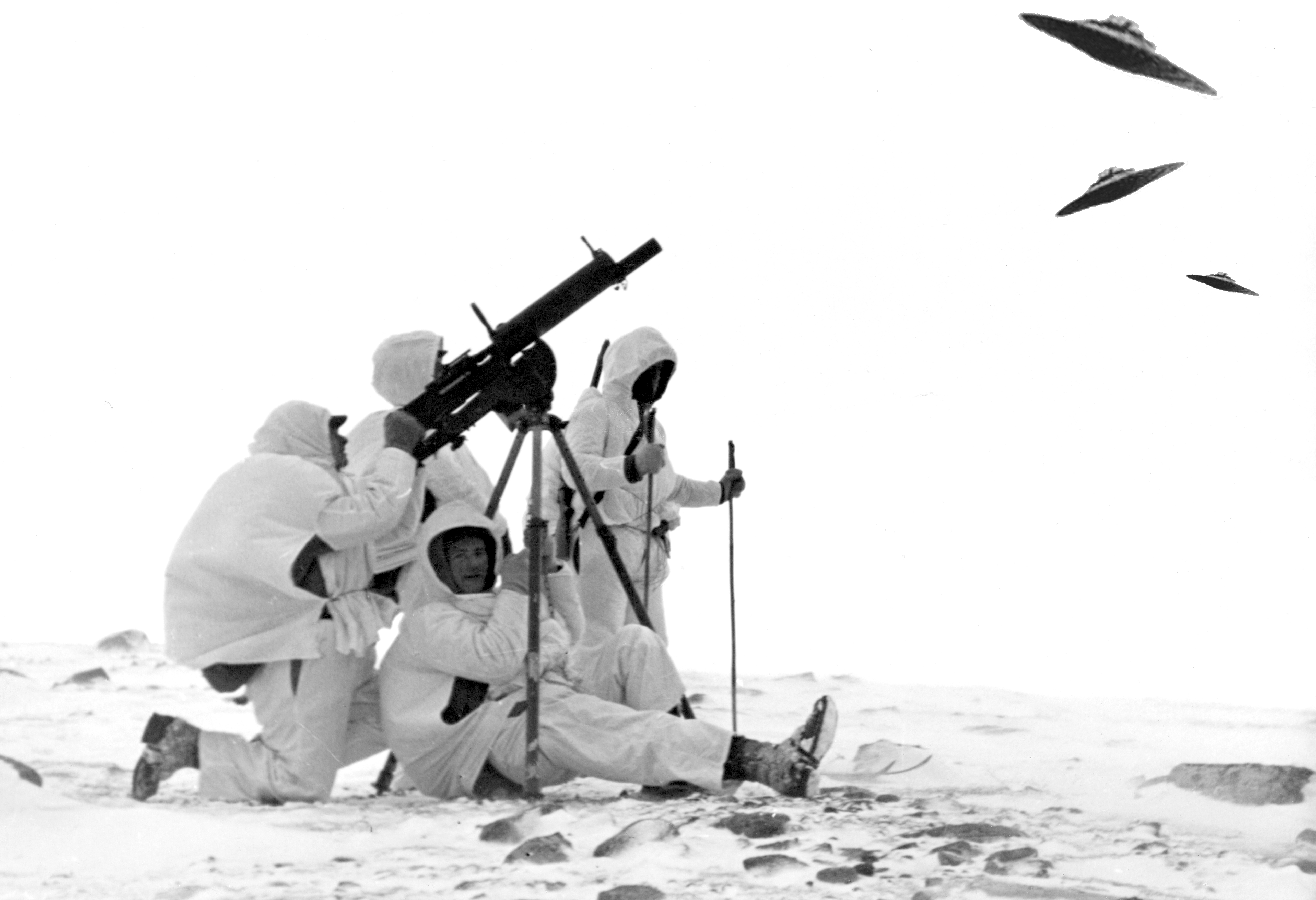 Format: Fotopositiv Dato / Date: 1 April 1939 Fotograf / Photographer: Spesialagent Fritz Lang (1890 - 1976) Sted / Place: Dronning Mauds Land, Antarktis Wikipedia: Neuschwabenland Wikipedia: Wunderwaffe Eier / Owner Institution: Trondheim byarkiv, The Municipal Archives of Trondheim Arkivreferanse / Archive reference: SA2015002 Merknad: Som respons på Nazi-Tysklands dårlig skjulte forsøk på å tilegne seg Dronning Mauds Land 1938 - 1939 ble et knippe spesialkommandoer fra Trønderbataljonen sendt til Antarktis via Bouvetøya 1939. I Pencksøkket oppdaget ekspedisjonen tre mulig tyske farkoster som lettet og forsvant da Trønderbataljonen gav seg til kjenne.